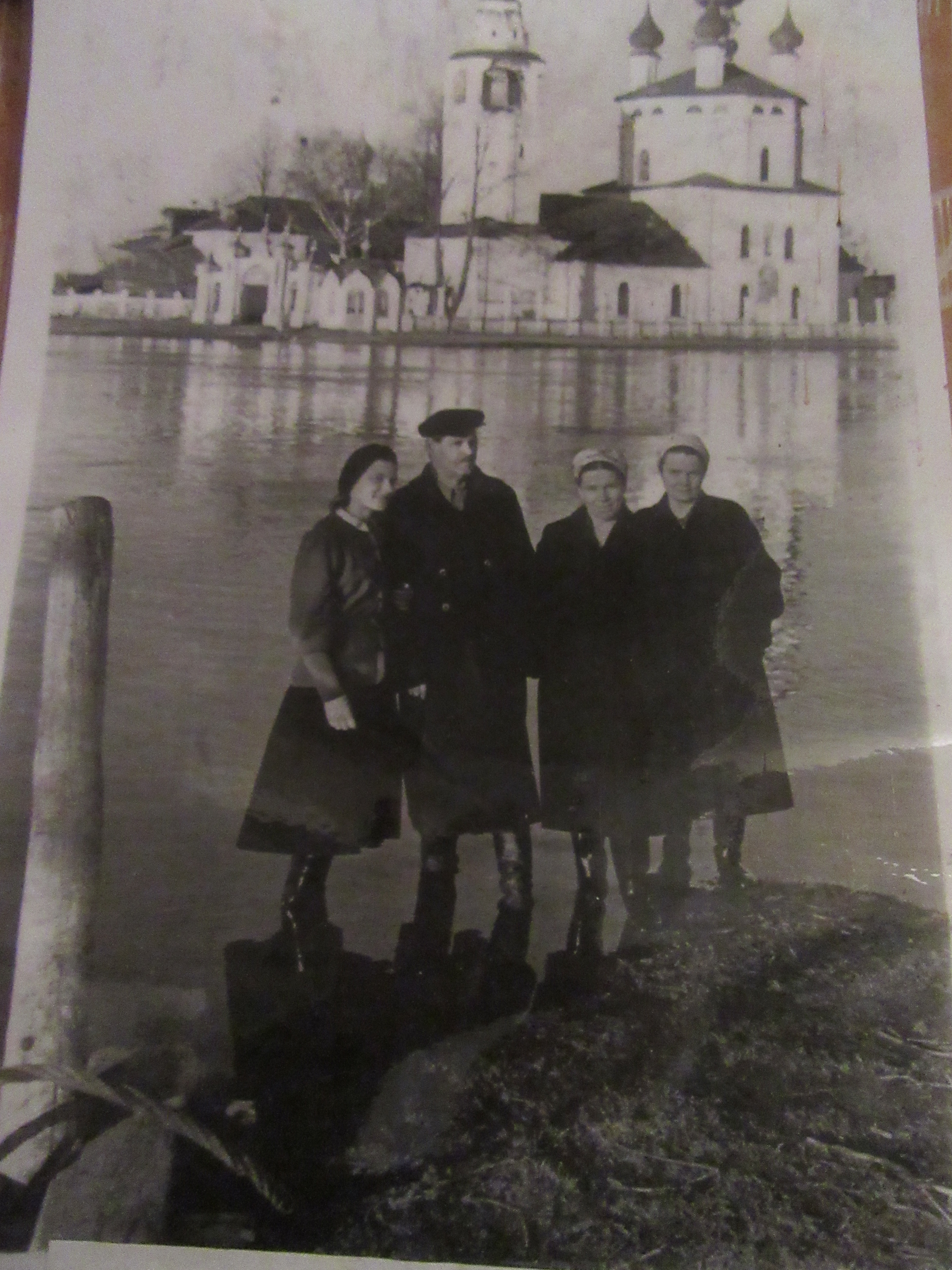 Montée des eaux de la rivière Teza inondant le village de Kholoui